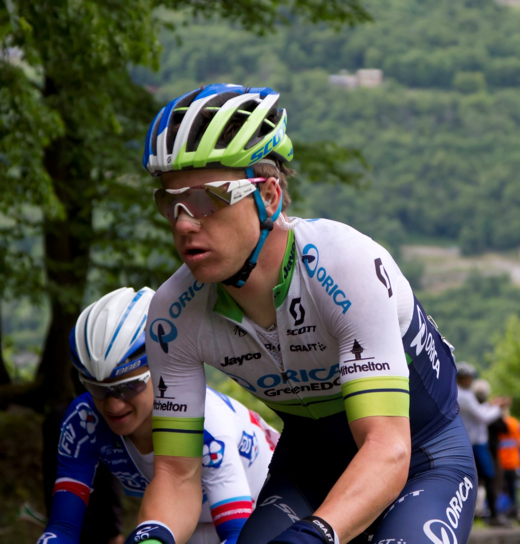 173 simon clarke